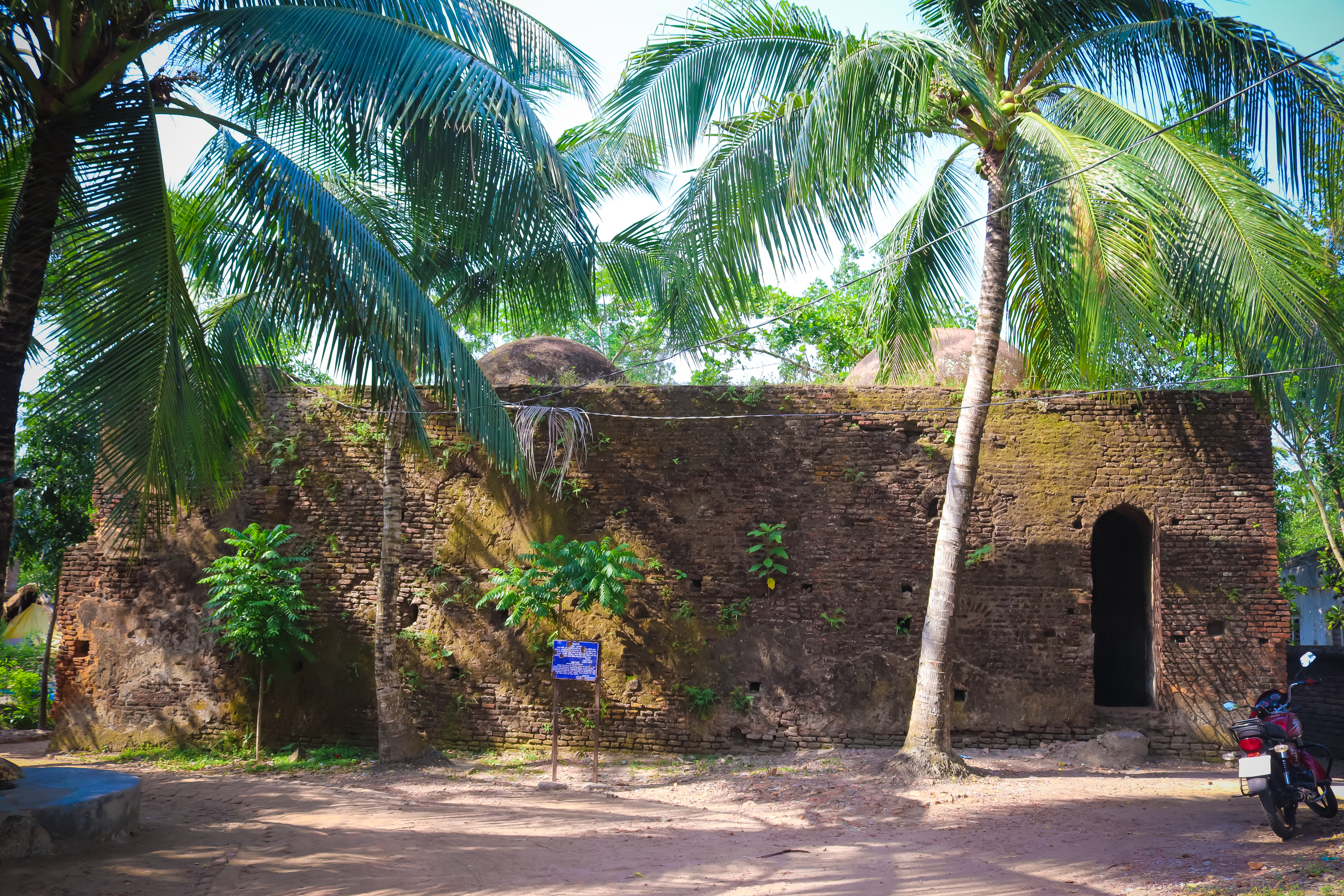 ইশ্বরীপুর হাম্মামখানা